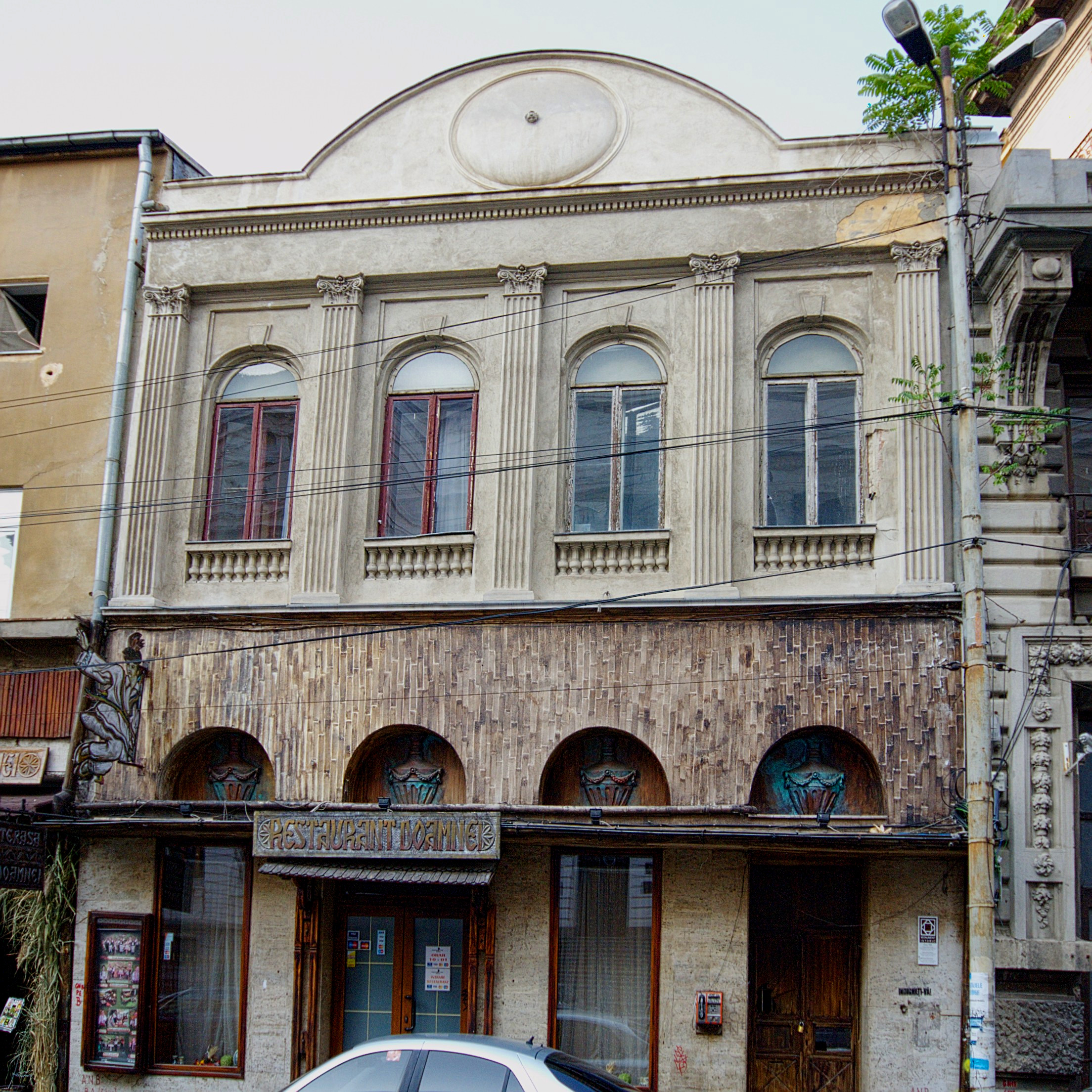 Cinema Doina (Terra), Doamnei 9